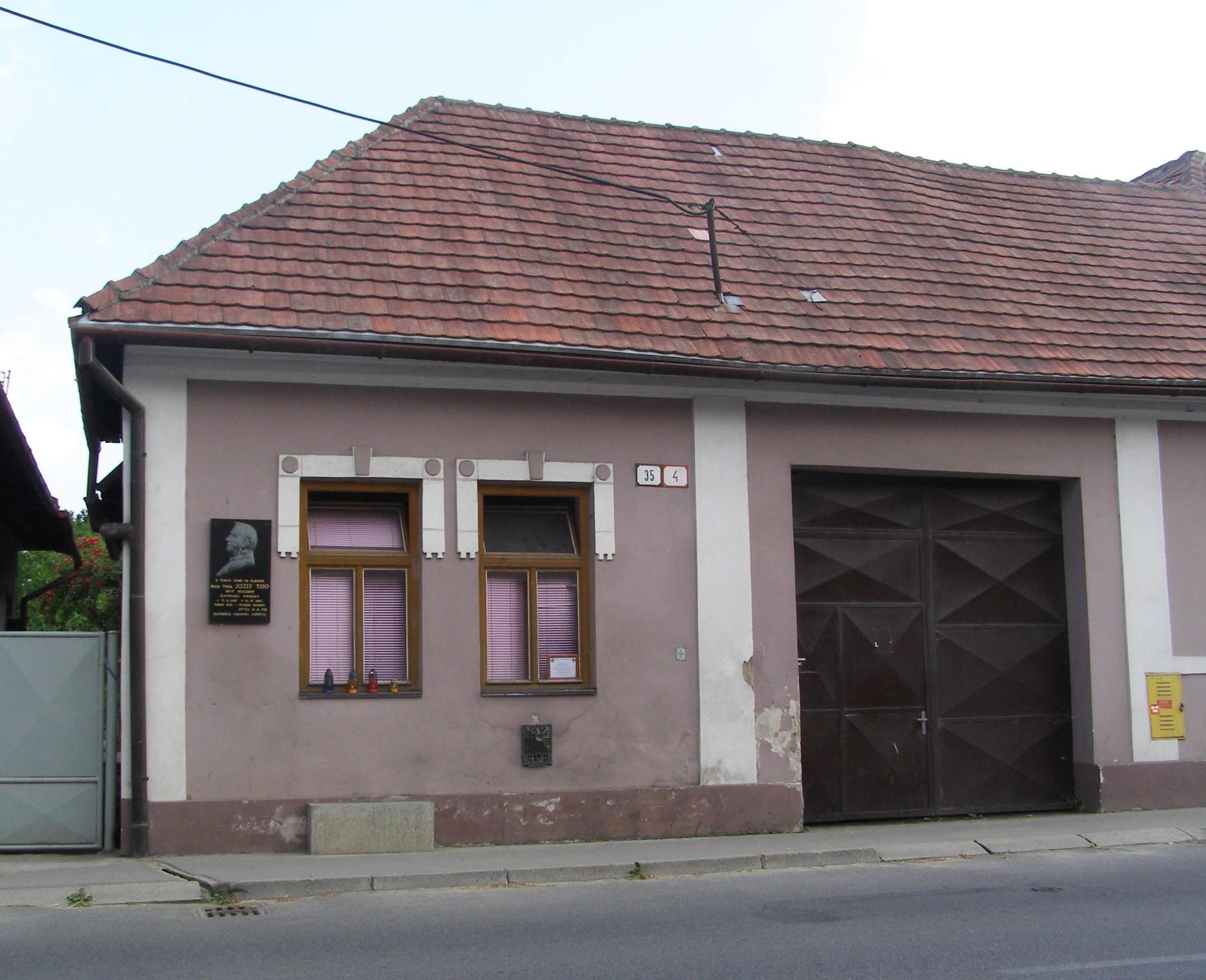 Jozef Tiso birthplace house, Bytča, Slovakia